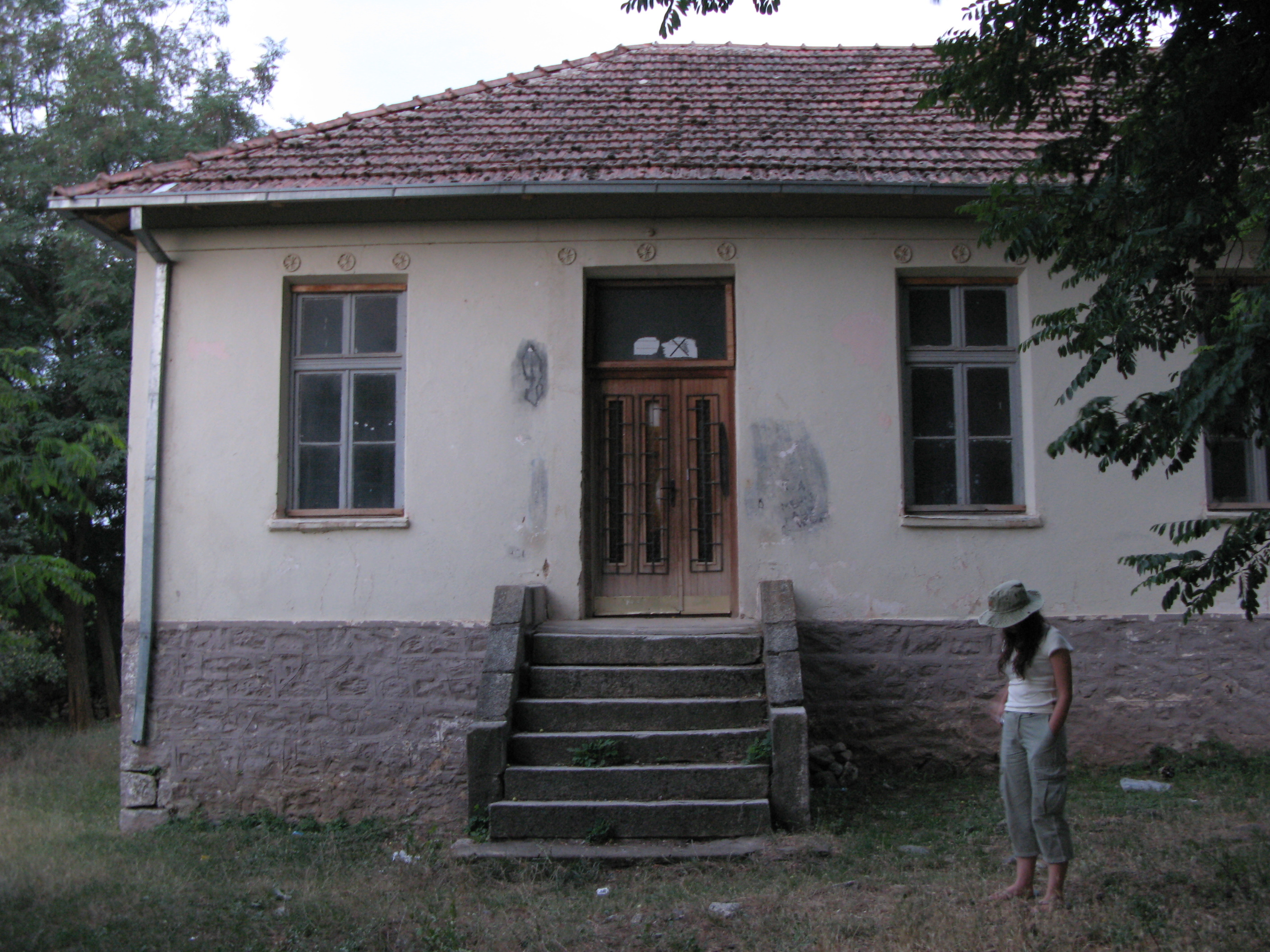 Напуштена сеоска школа у Ротину.